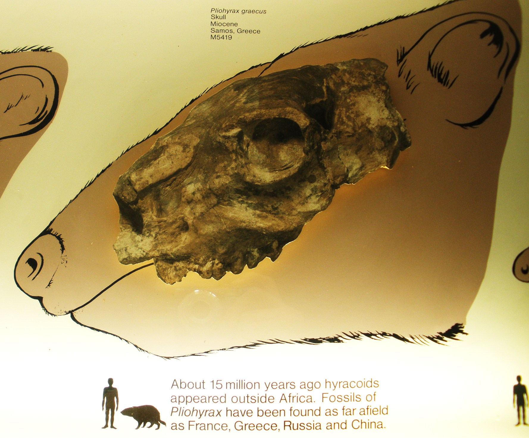 Fossil of Pliohyrax, an extinct mammal -- Took the photo at Natural History Museum, London